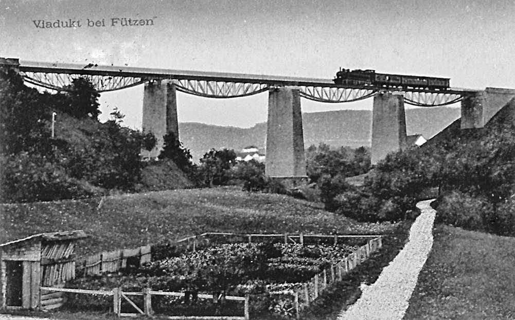 Postkarte der Wutachtalbahn, Fützener Viadukt, lt. Literaturangabe „um 1920“ (in: D. Reimer/B. Prillwitz: Sauschwänzlebahn, Sutton Verlag, Erfurt 2010, S. 33). Produziert im Postkartenverlag Gebrüder Metz, ohne Fotografenangabe.